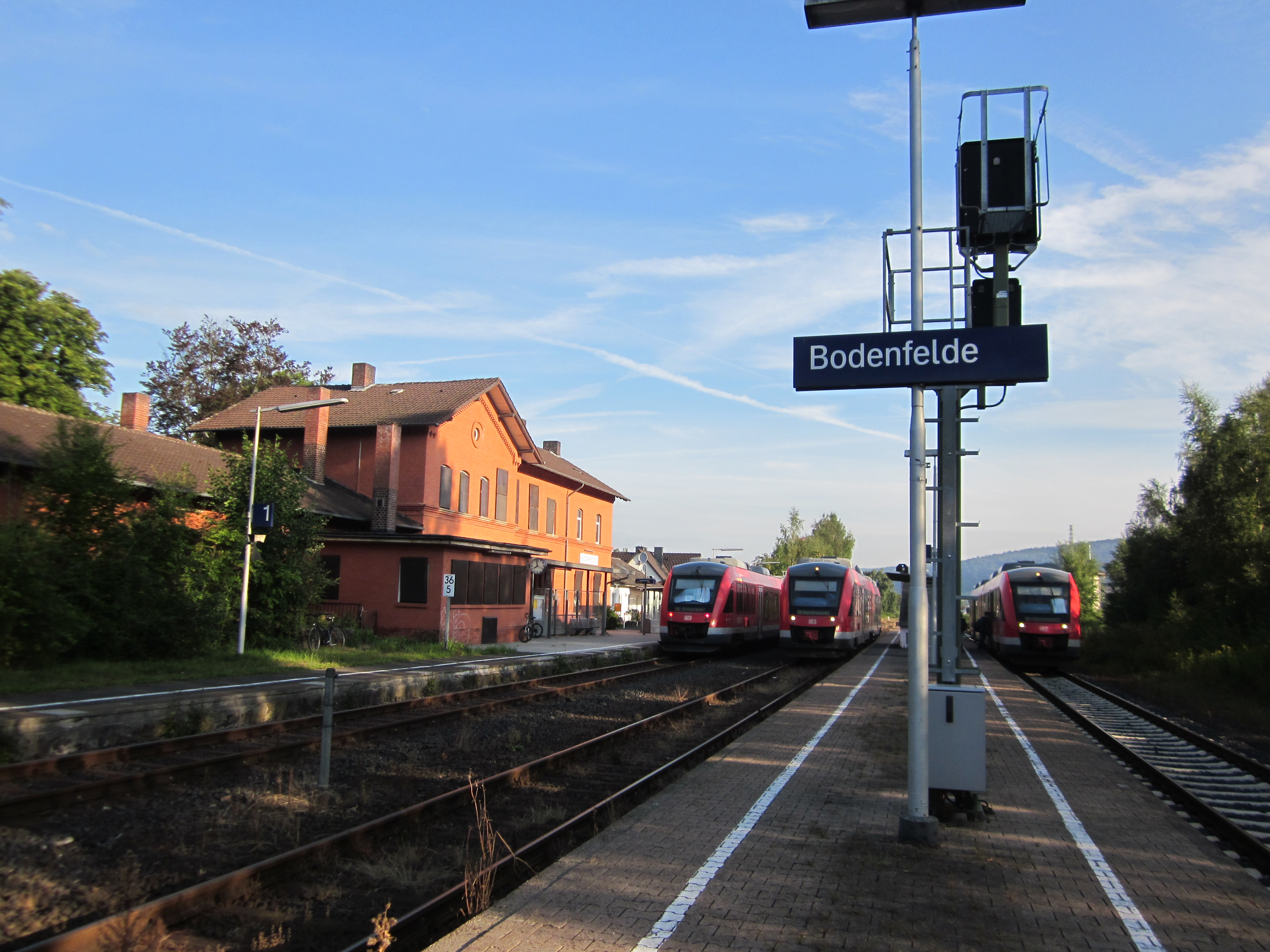 Drei Lint der DB-Harz-Weser-Bahn begegnen sich 2013 in Bodenfelde. Sie fahren weiter nach Ottbergen, Nordhausen und Göttingen.